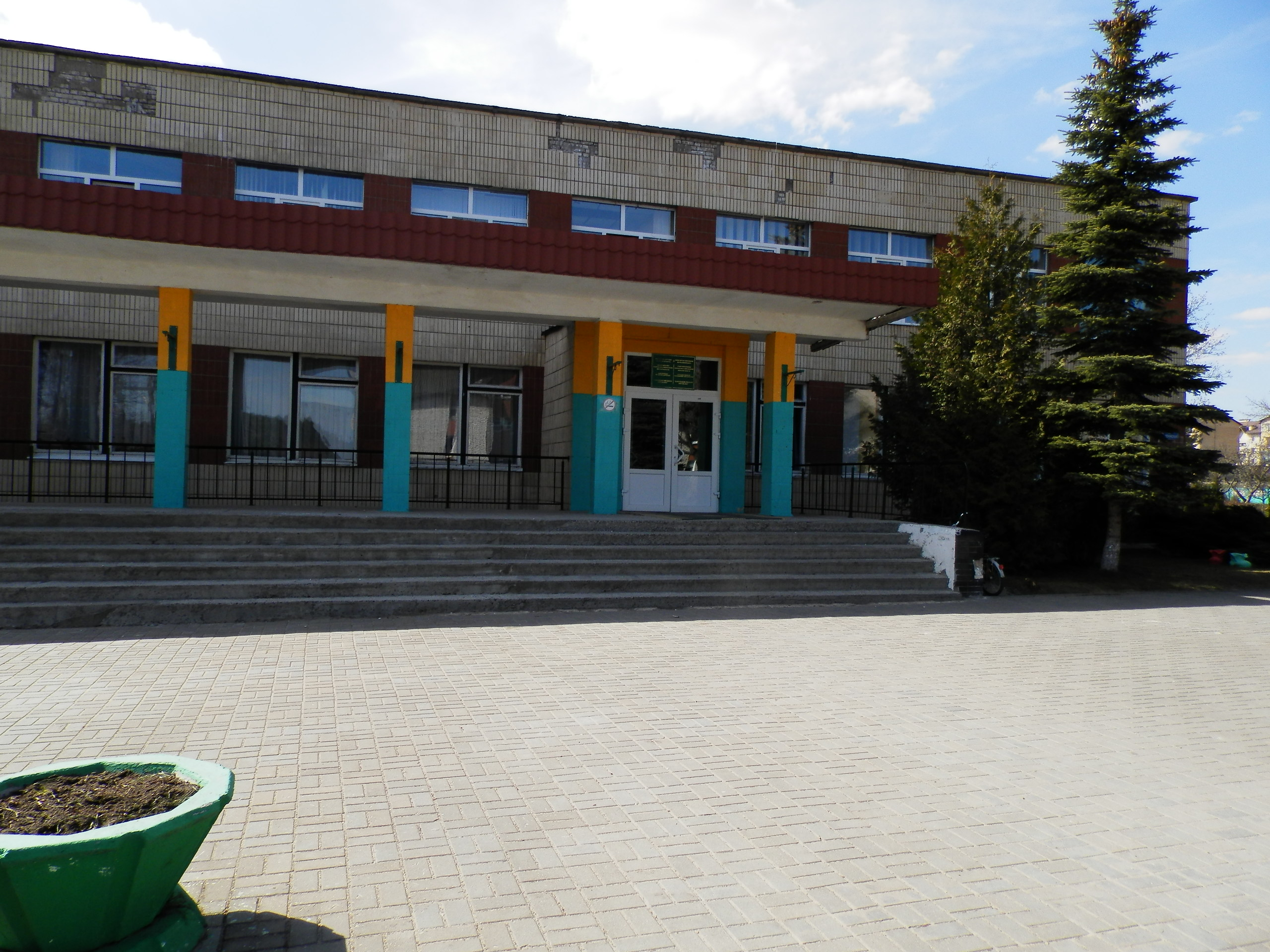 Средняя школа №2 кп Нарочь